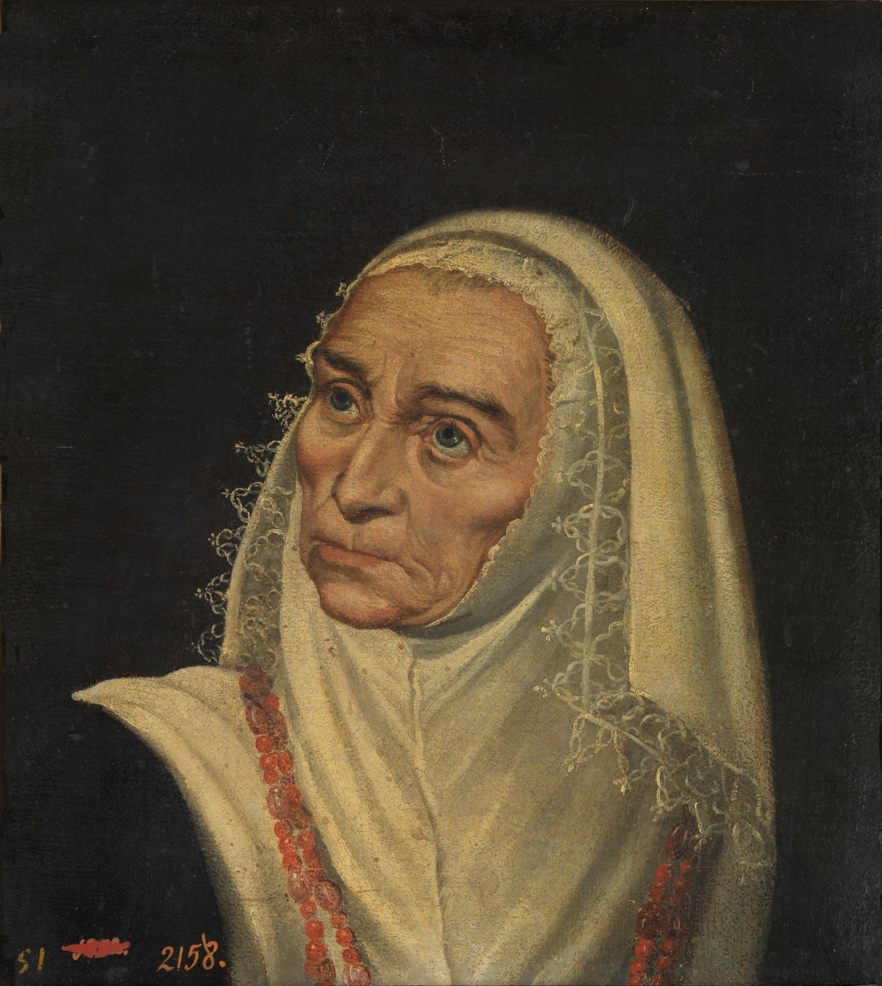 Magdalena Ruiz Hacia 1580. Óleo sobre lienzo, 41,5 x 36 cm. Colección Real (colección Felipe V, Quinta del duque del Arco, El Pardo-Madrid, sexta pieza que sirve de gabinete, 1745, [¿nº 94?]; Quinta del duque del Arco, pieza de paso al gabinete, 1794, nº 277 bis). 17th century copy from this painting